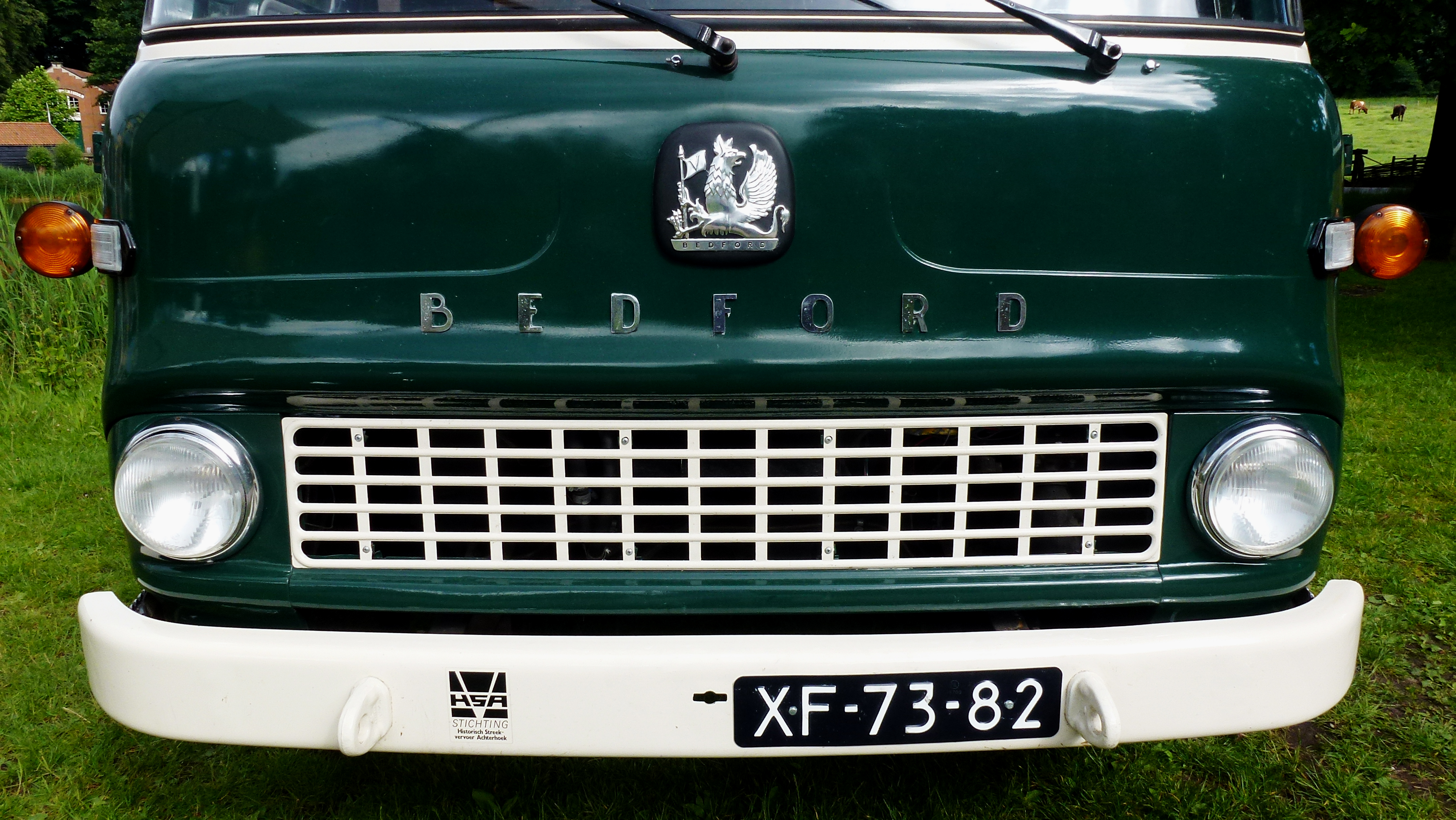 Bedford TK (vrachtwagen 853). Van dit type stonden er velen in dienst van het transportbedrijf GTW Gelderse Tramwegen Motor/chassis/cabine: Bedford Vehicles (type TK), Luton (GB ), bouwjaar 1967. De Bedford TK behoort tot de collectie van Stichting Historisch Streekvervoer Achterhoek. Fotolocatie: Nederlands Openluchtmuseum in Arnhem